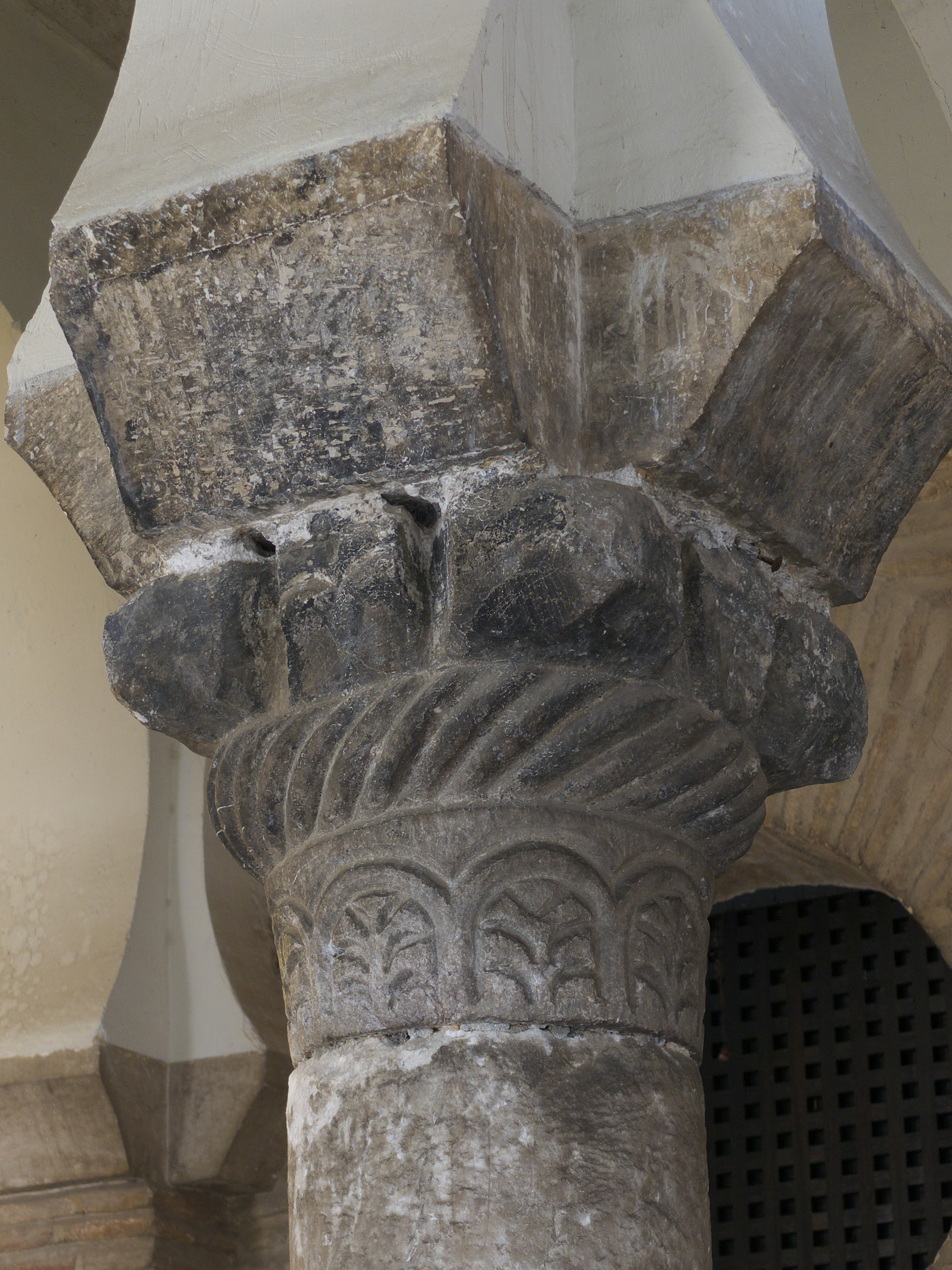 La mezquita califal toledana (999) reutilizó materiales de acarreo. Los capiteles empleados por Muza ibn Alí son visigodos, de influencia bizantina (s. VII d.C.).